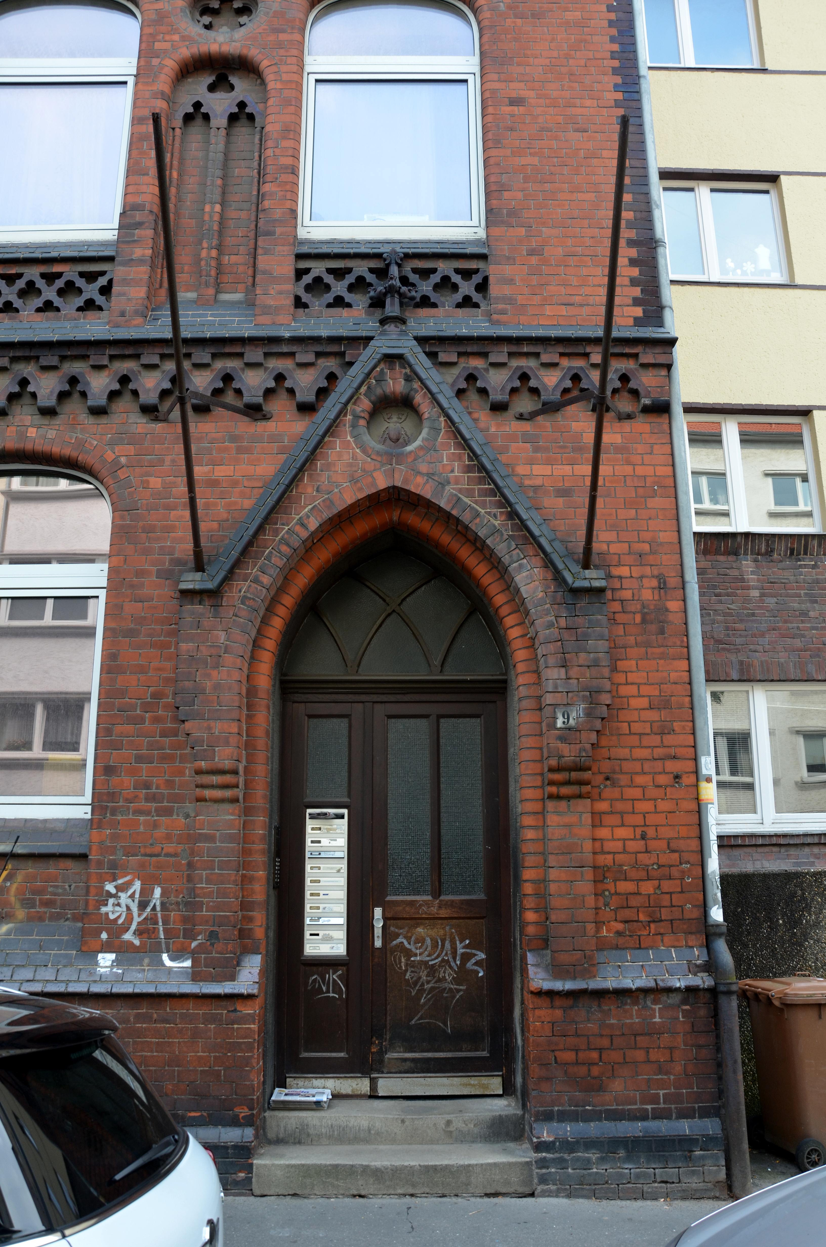 Detail-Blick auf das denkmalgeschützte, in den 1890er Jahren erbaute Haus Jakobistraße 9 Ecke Edenstraße in Hannover, Stadtteil List. Der ehemalige Verwaltungssitz der Fabrik des Heizungsbauers Fritz Kaeferle zeigt über dem Hauseingang das Fabrikzeichen des Maikäfers ...